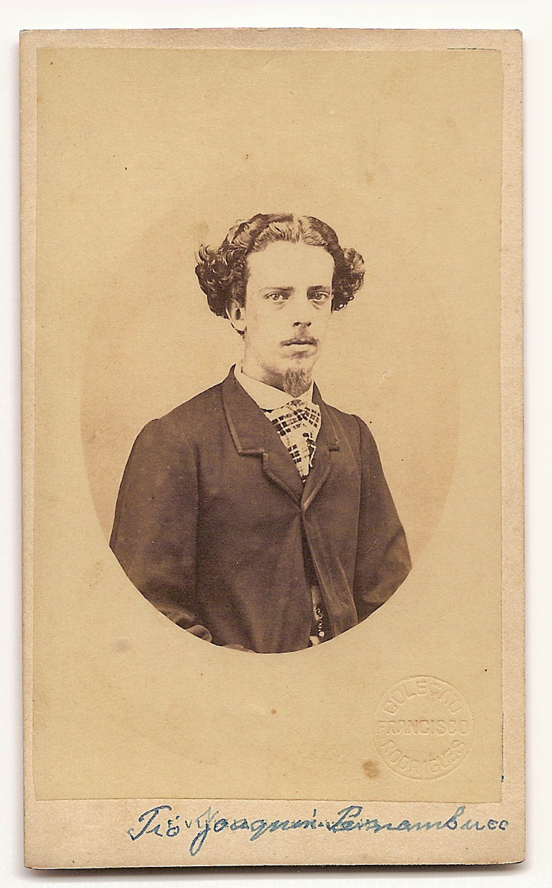 Miguel José de Almeida Pernambuco: presidente do Pará, bacharel em 1860.